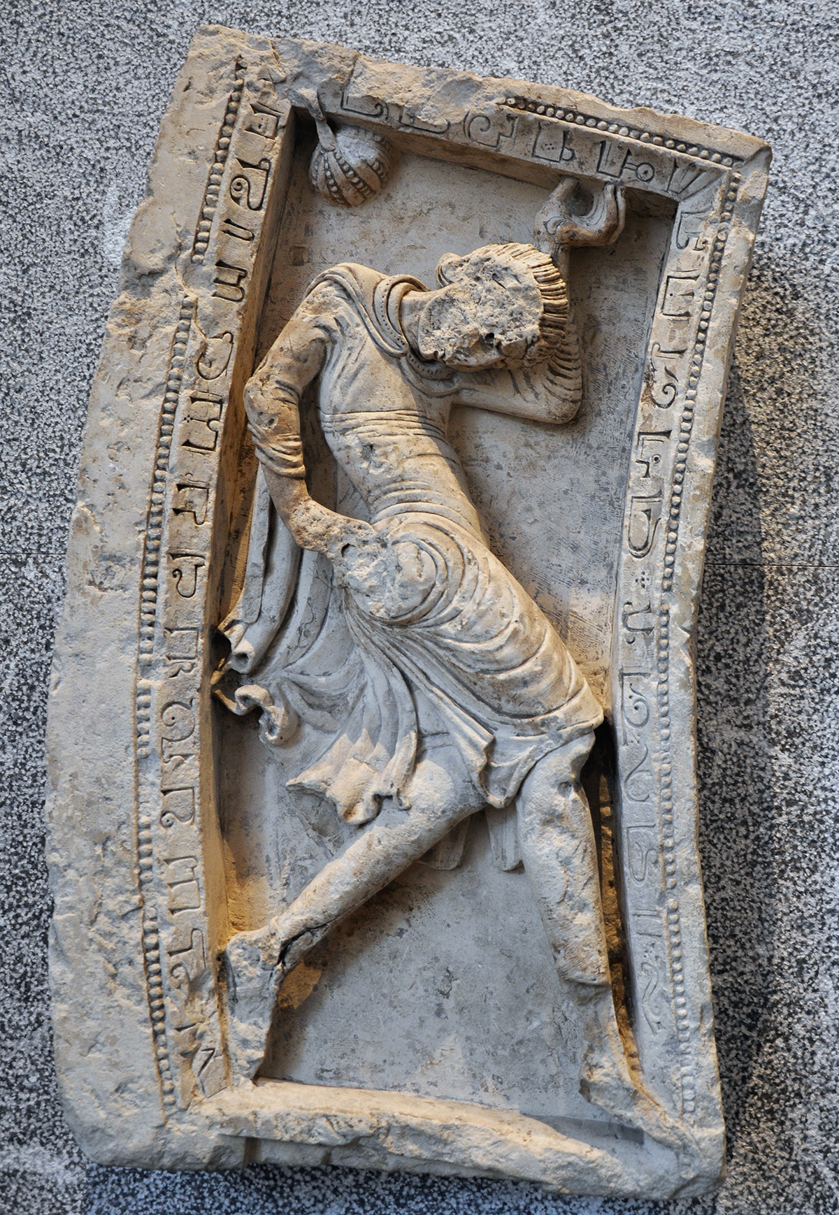 Jongleur, bas-relief en calcaire, 3ème quart du 12ème siècle, proviendrait de l'ancienne église Saint-Pierre-le-Puellier à Bourges. Musée des Beaux-Arts de Lyon.